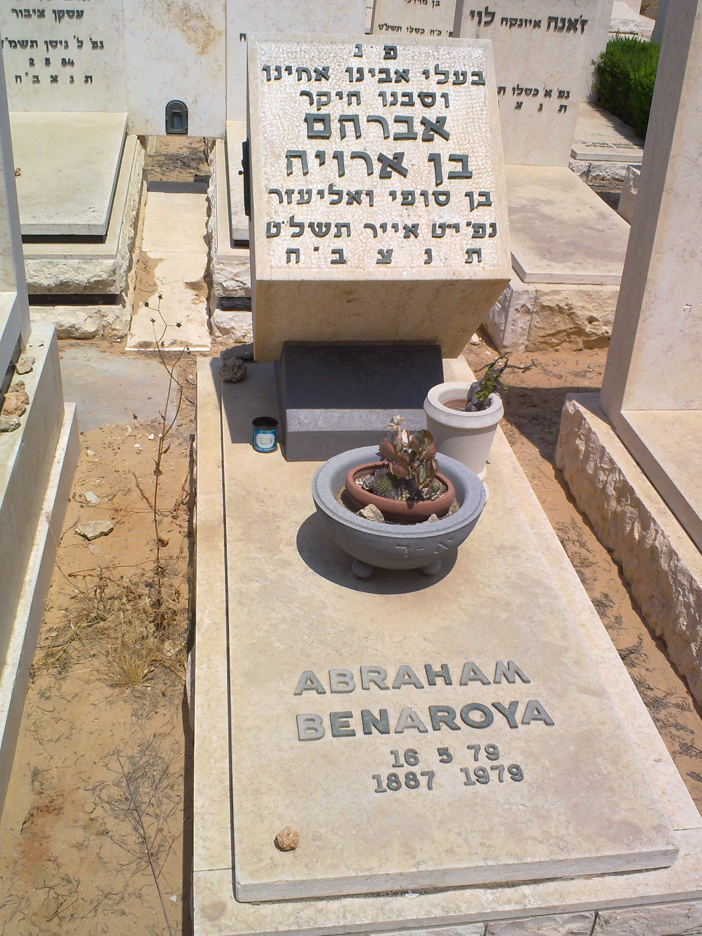 אברהם בן ארויה, מייסד המפלגה הקומוניסטית של יוון ומנהיג פועלים בסלוניקי